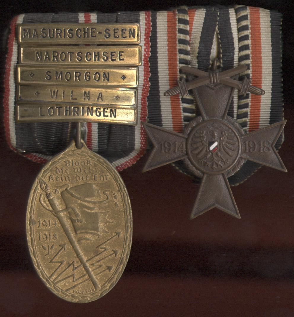 Kriegsehrenkreuz vom Ehrenbund deutscher Weltkriegsteilnehmer ist eine nichtstaatliche deutsche Weltkriegs-Gedenk-Auszeichnung, aus der Zeit der Weimarer Republik; hier montiert an großer Ordensschnalle v.l.n.r.: Kyffhäuser-Kriegsdenkmünze 1914–18 mit fünf Gefechtsspangen Kriegsehrenkreuz.